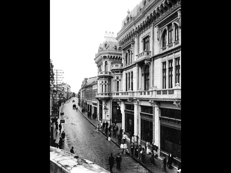 Craiova - Fostul Cazino Craiova, devenit mai apoi Hotel Minerva